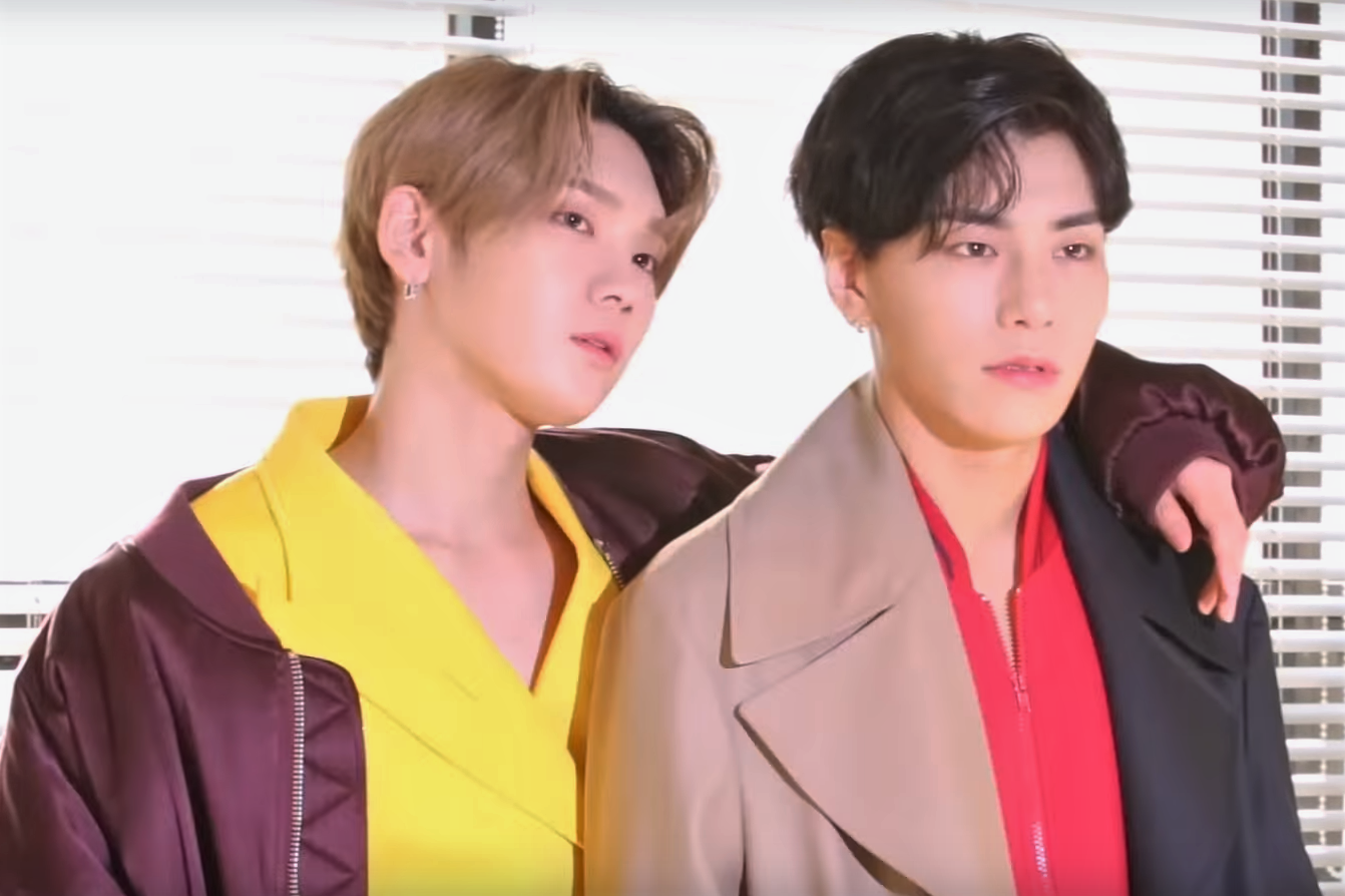 소년에서 남자가 되어 돌아온 JBJ95 (텐스타 10월호 비하인드)